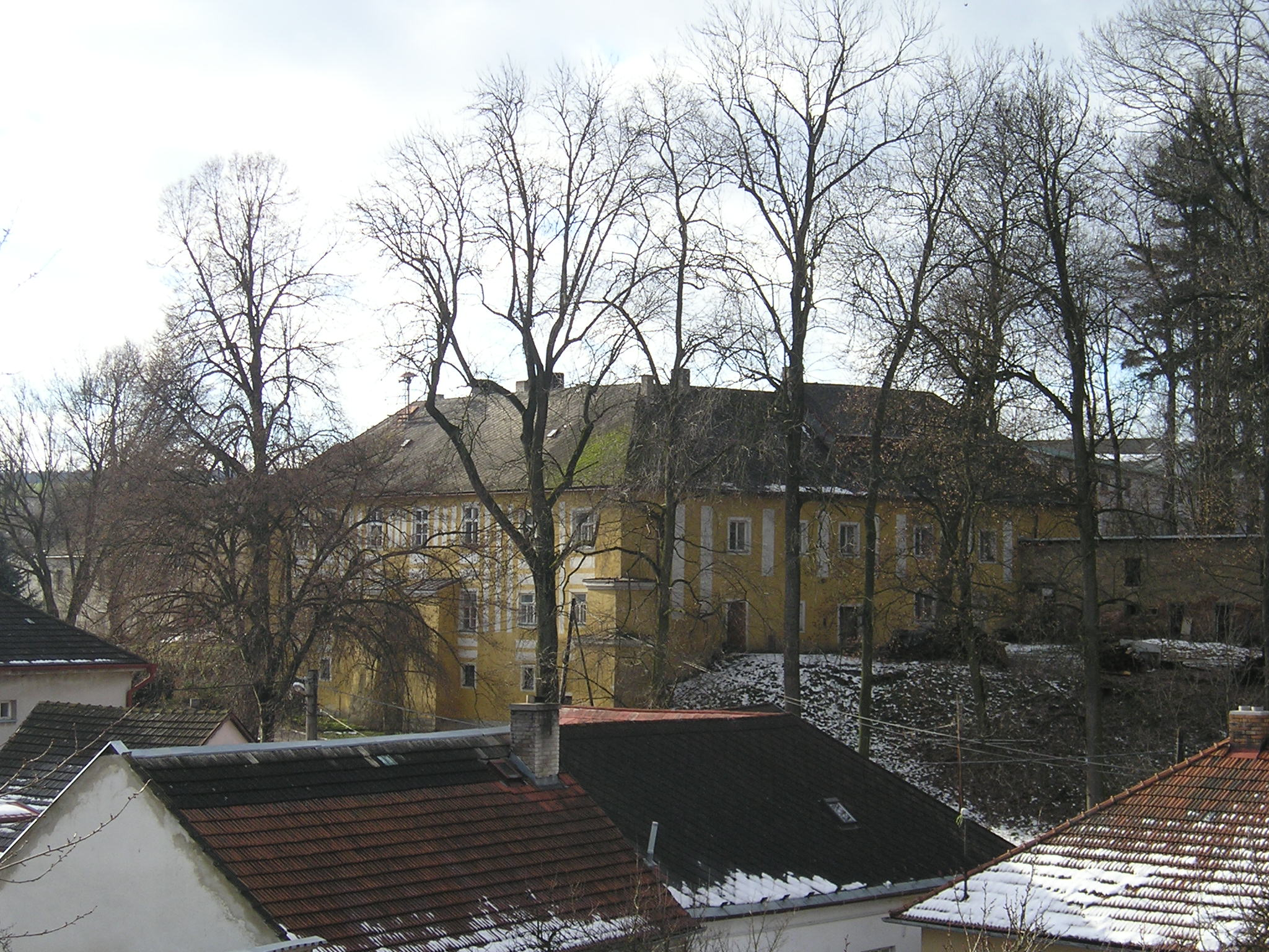 Puklický zámek (pohled z vesnice)